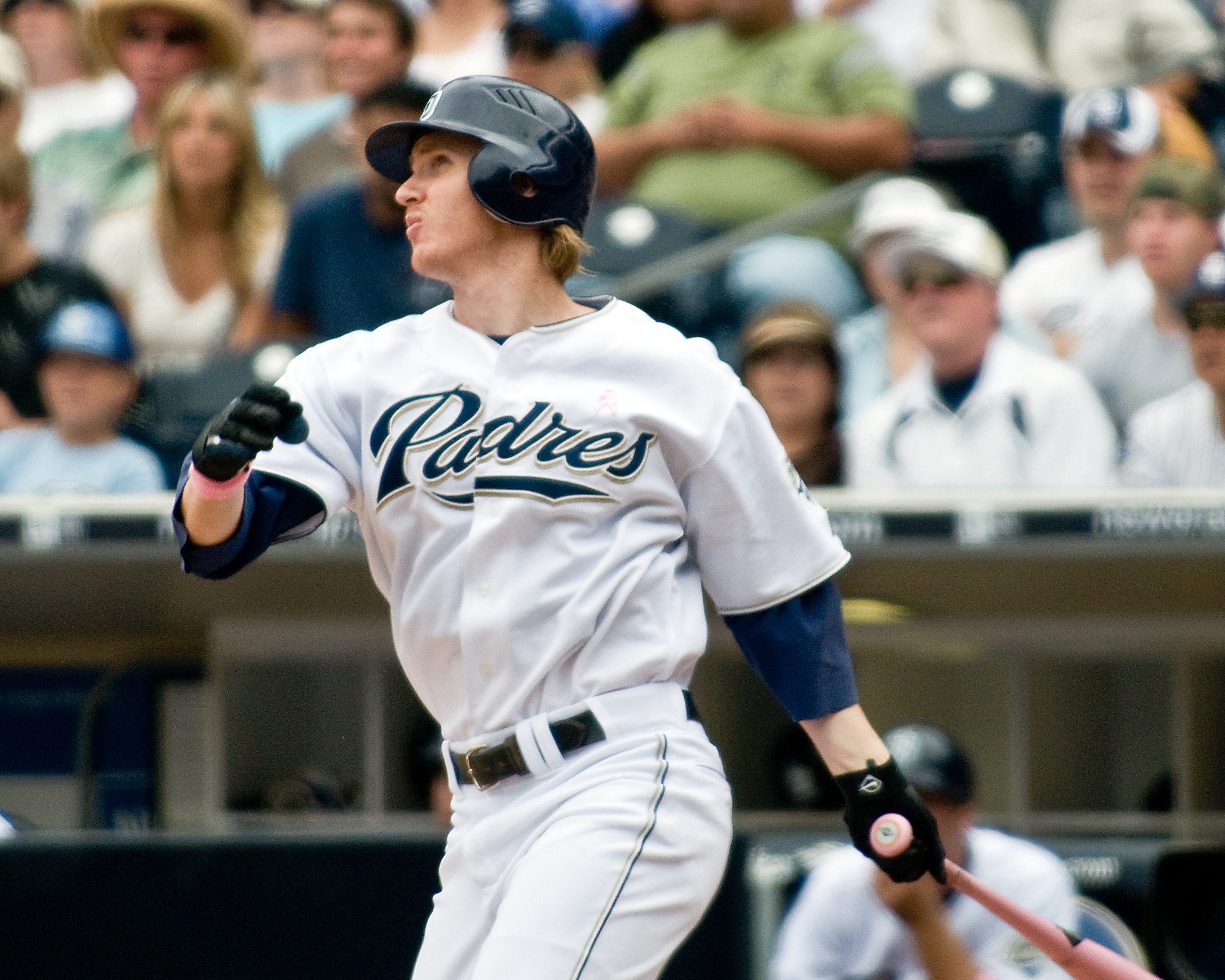 Khalil Greene